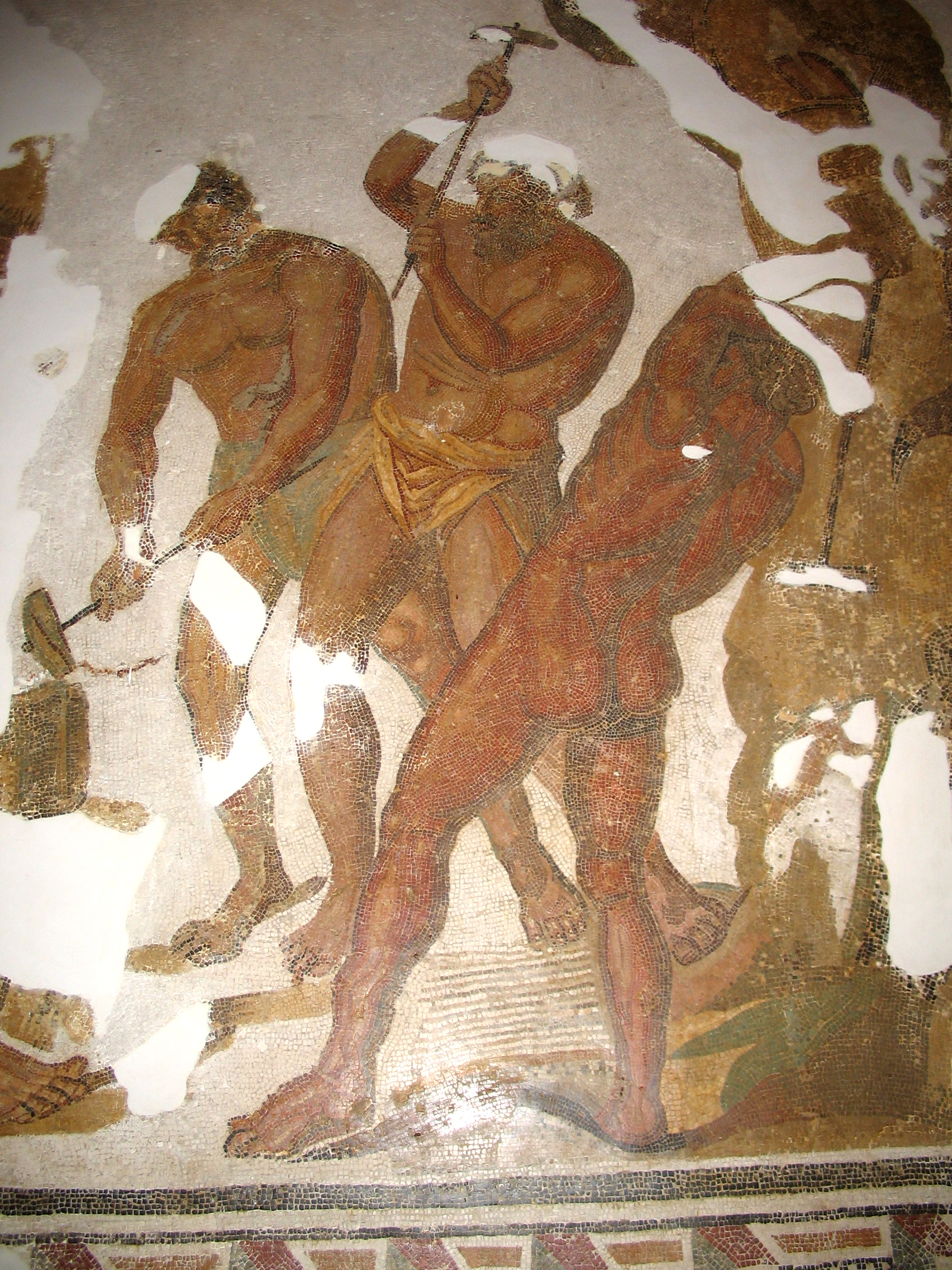 Fucina. Mosaico pavimentale romano al Museo del Bardo a Tunisi. III secolo d.C.